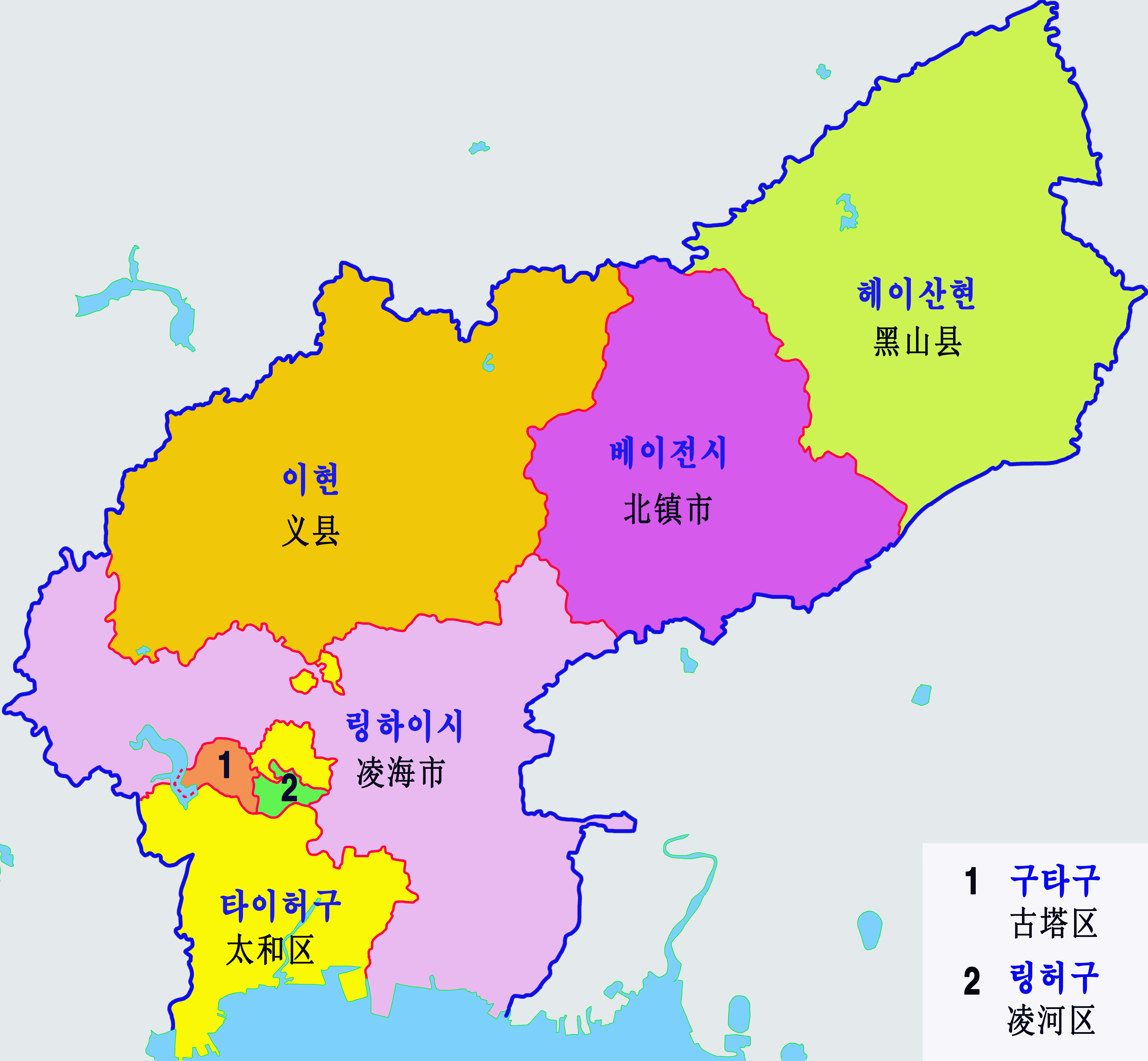 진저우 지도